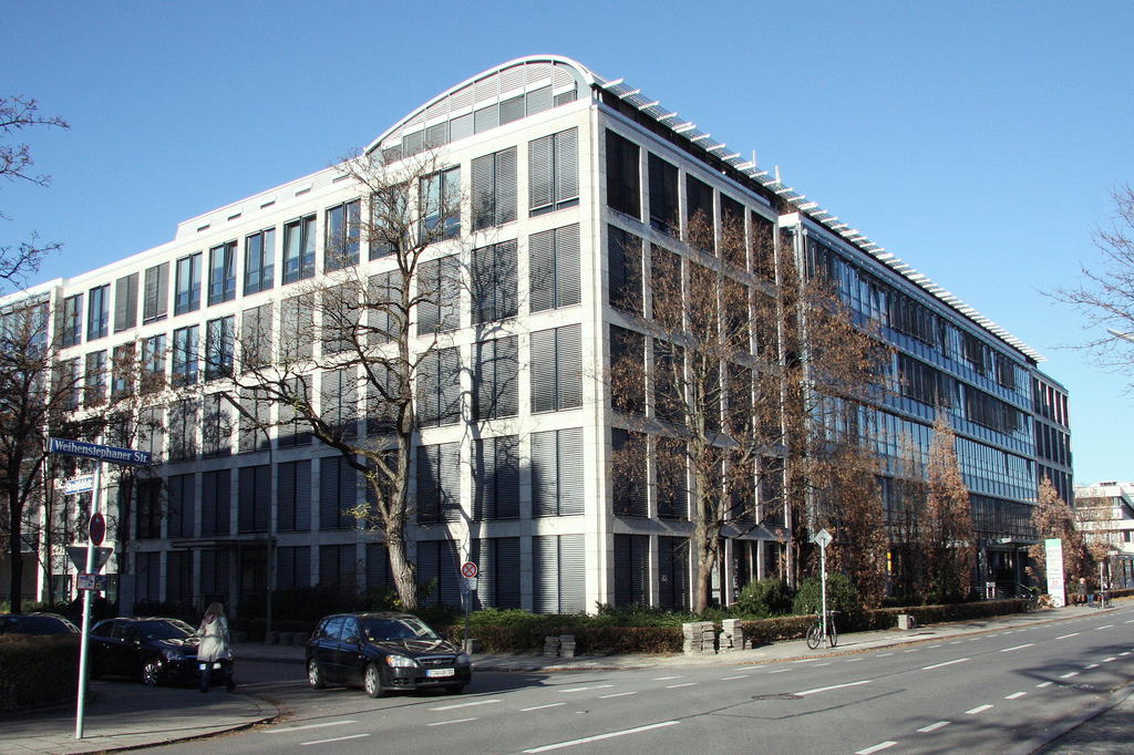 Verlagshaus Gruner+Jahr in der Weihenstephaner Straße in München